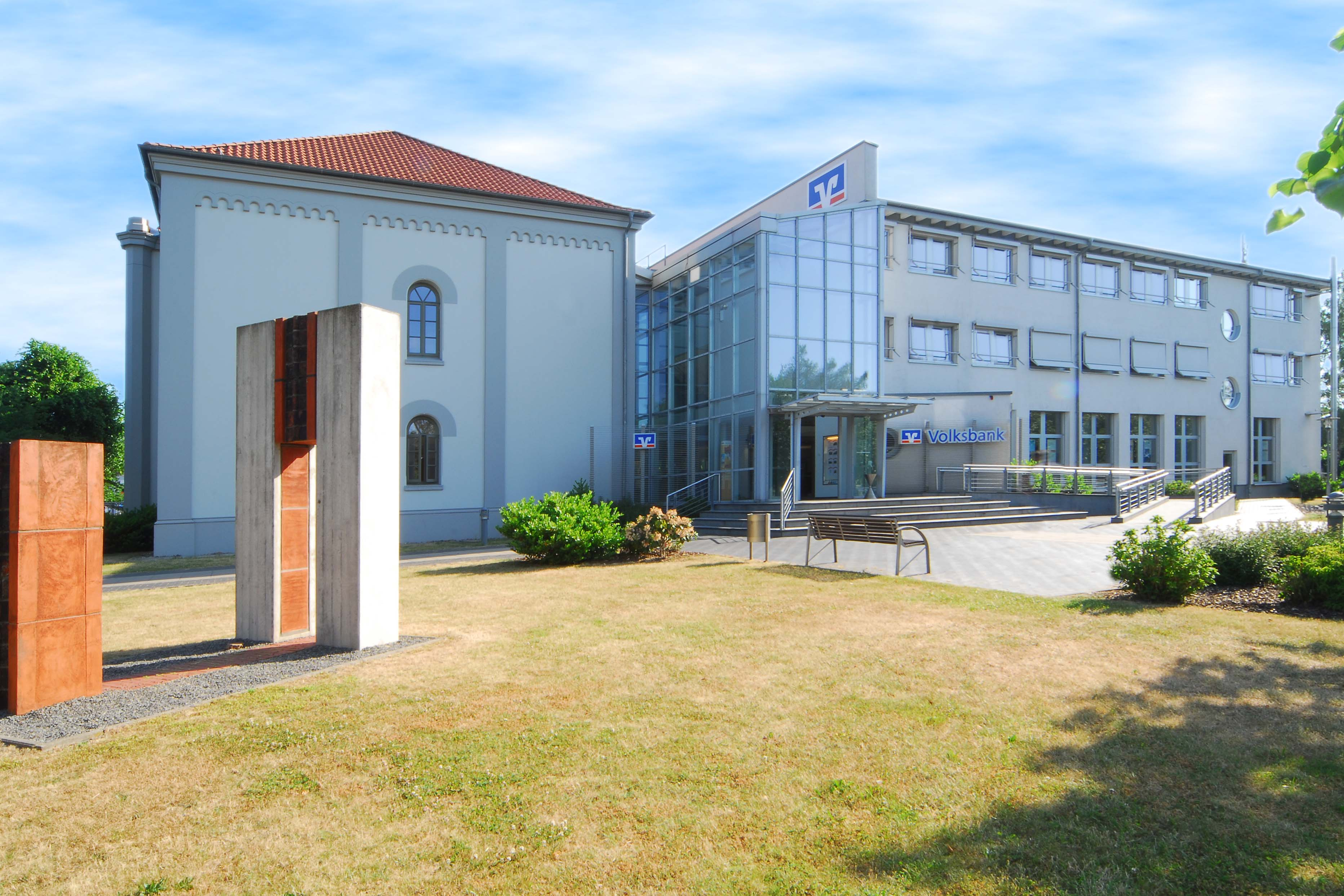 Das Alte Amtsgericht - Verwaltungssitz der Volksbank eG in Bassum